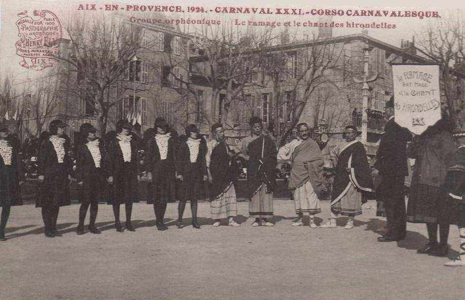 Le Groupe Orphéonique Le Ramage et le chant des hirondelles au Carnaval d'Aix-en-Provence 1924.